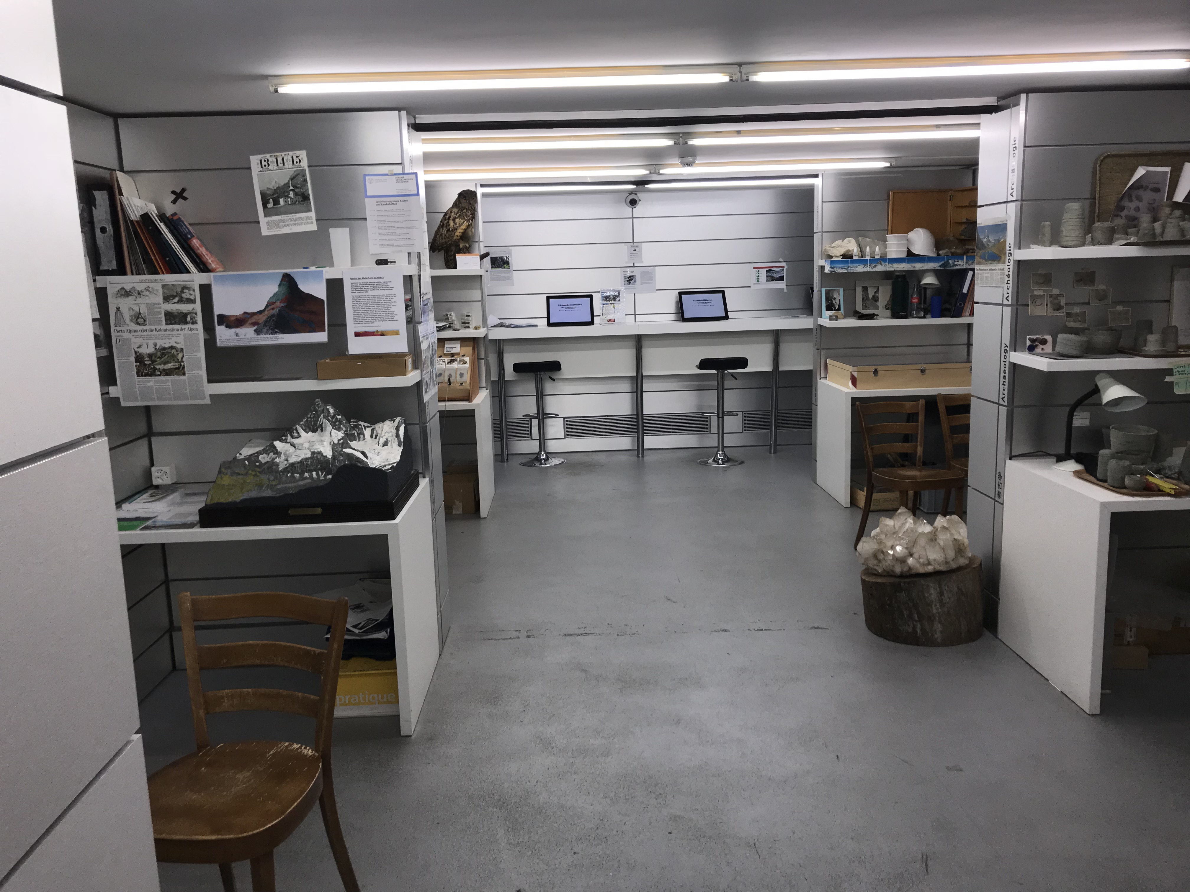 Matterhorn Museum in Zermatt Nachbau einer Forschungsstation